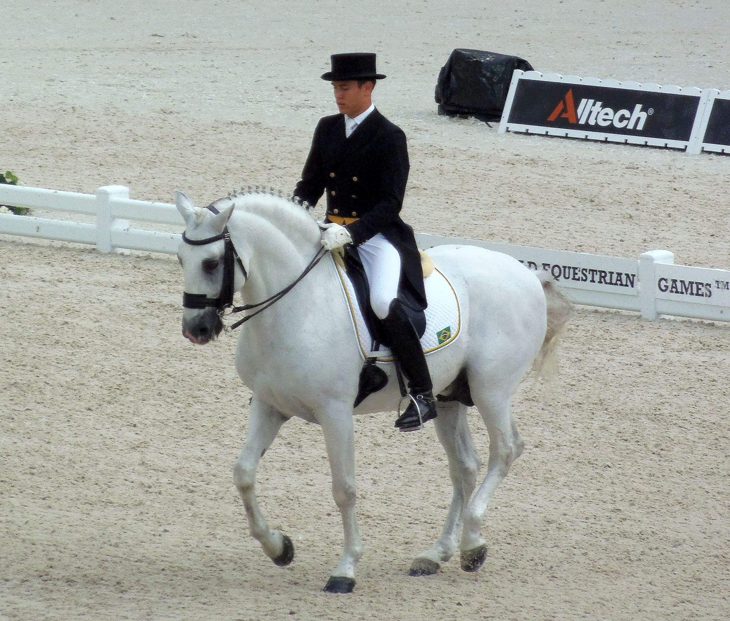 João Victor Oliva en selle sur Signo dos Pinhais lors des Jeux équestres mondiaux, le 26 août 2014 au stade d'Ornano à Caen (Normandie, France).